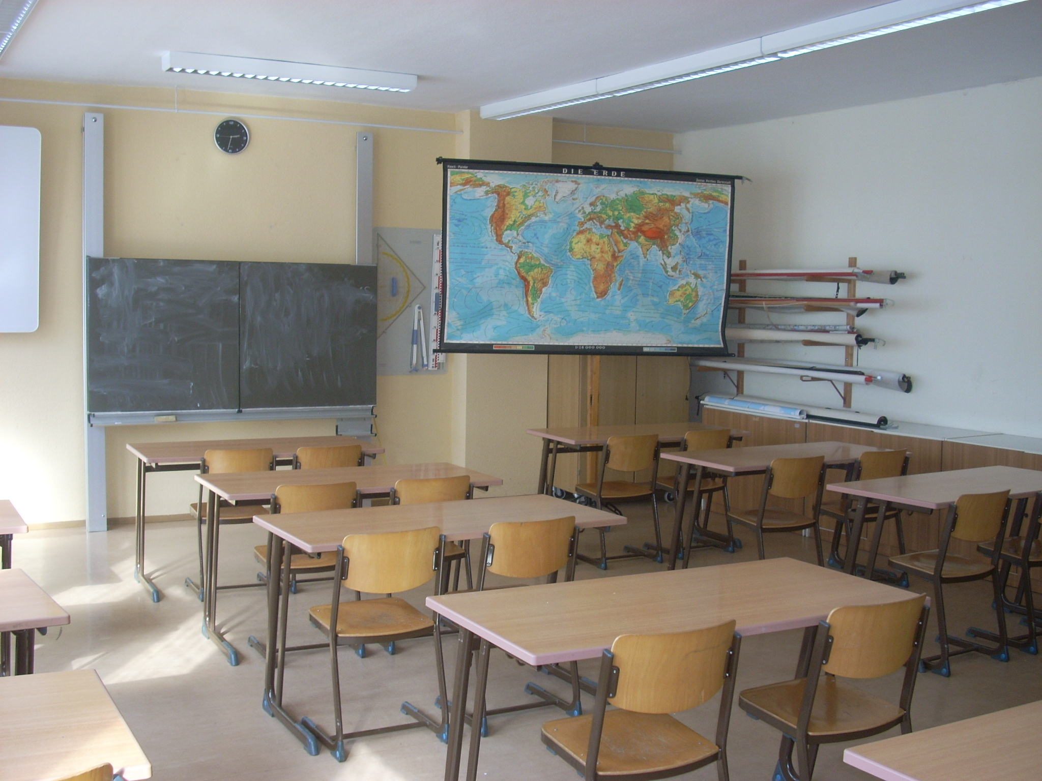 Geografieraum